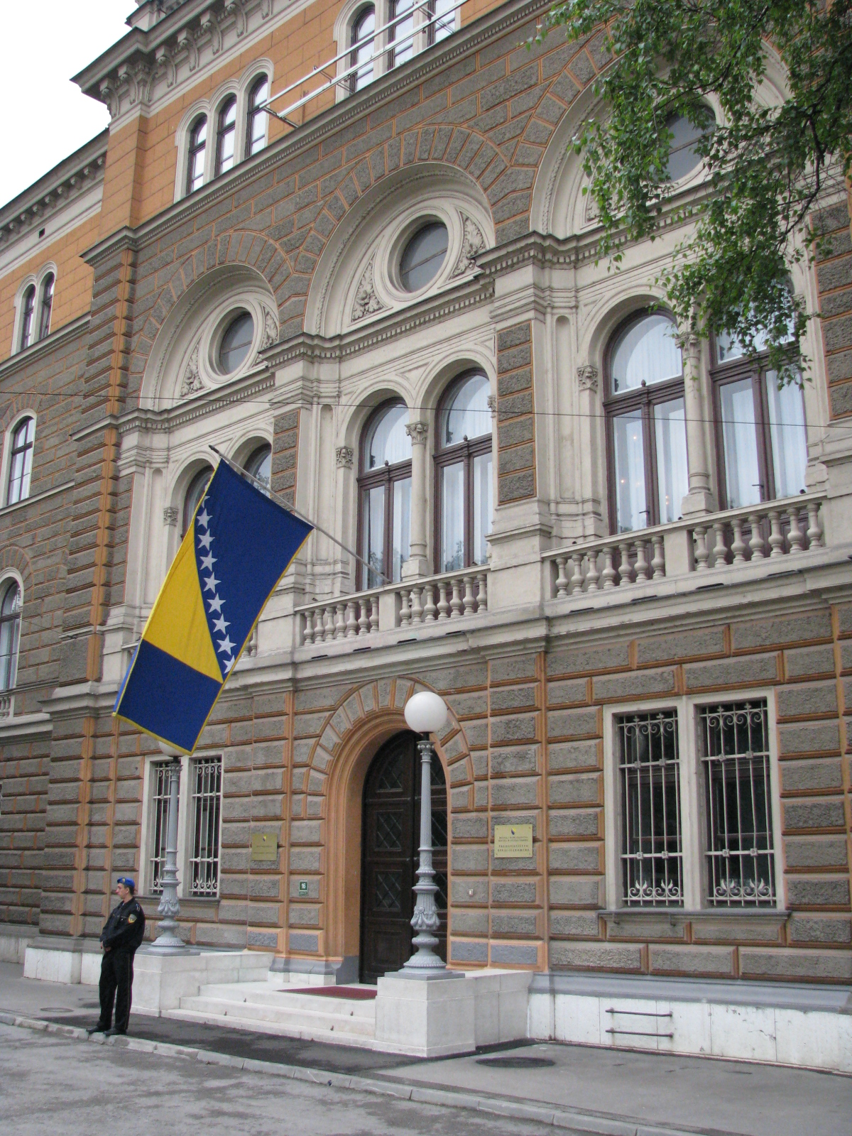 Zgrada Predsjedništva BiH, Sarajevo